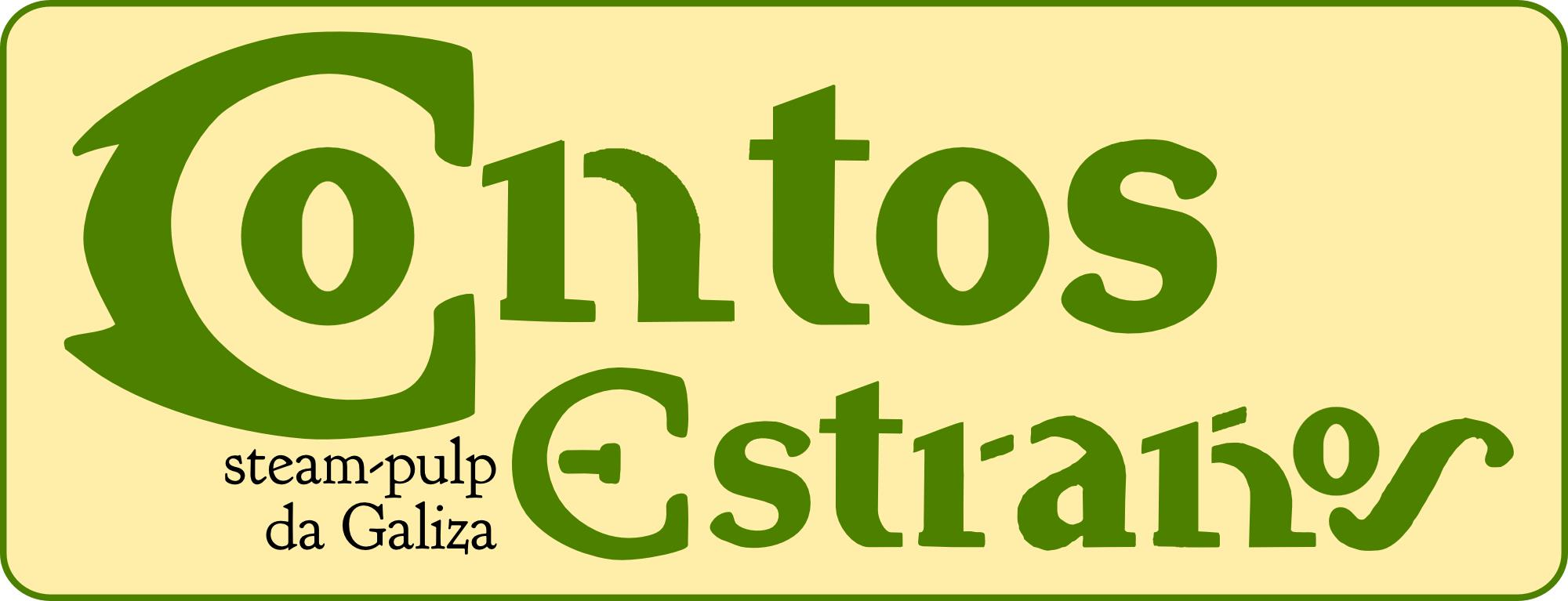 Contos estraños cabeceira